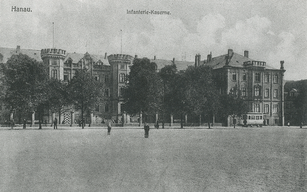 Paradeplatz nach Osten mit Blick auf die Infanteriekaserne